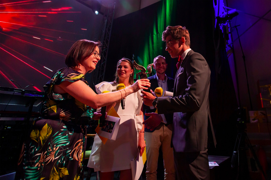 gala plebiscytu "Nieprzeciętni 2019" Czwórki Polskiego Radia